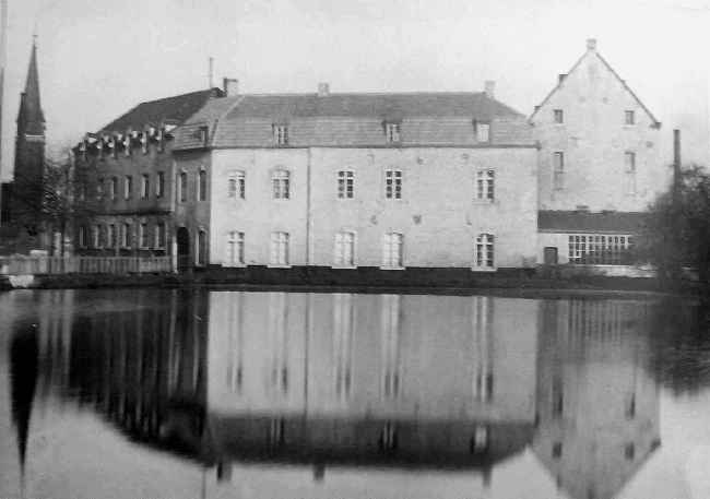 Bild der Ellermühle vor dem 2. Weltkrieg